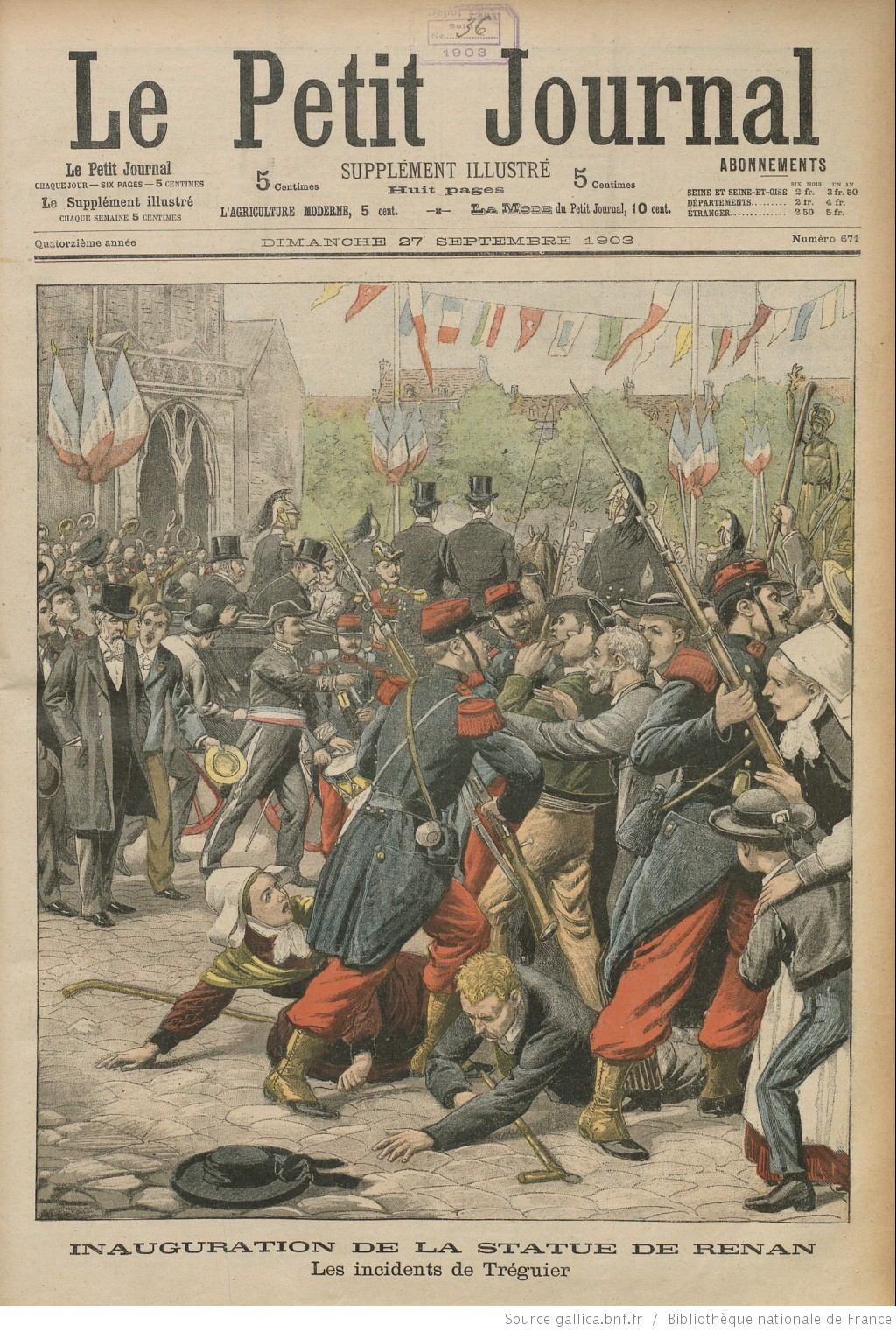 Portada del suplemento ilustrado de Le Petit Journal del domingo 27 de septiembre de 1903, n.º 671.